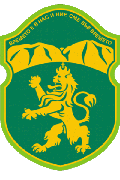 Karlovo_gerb.gif